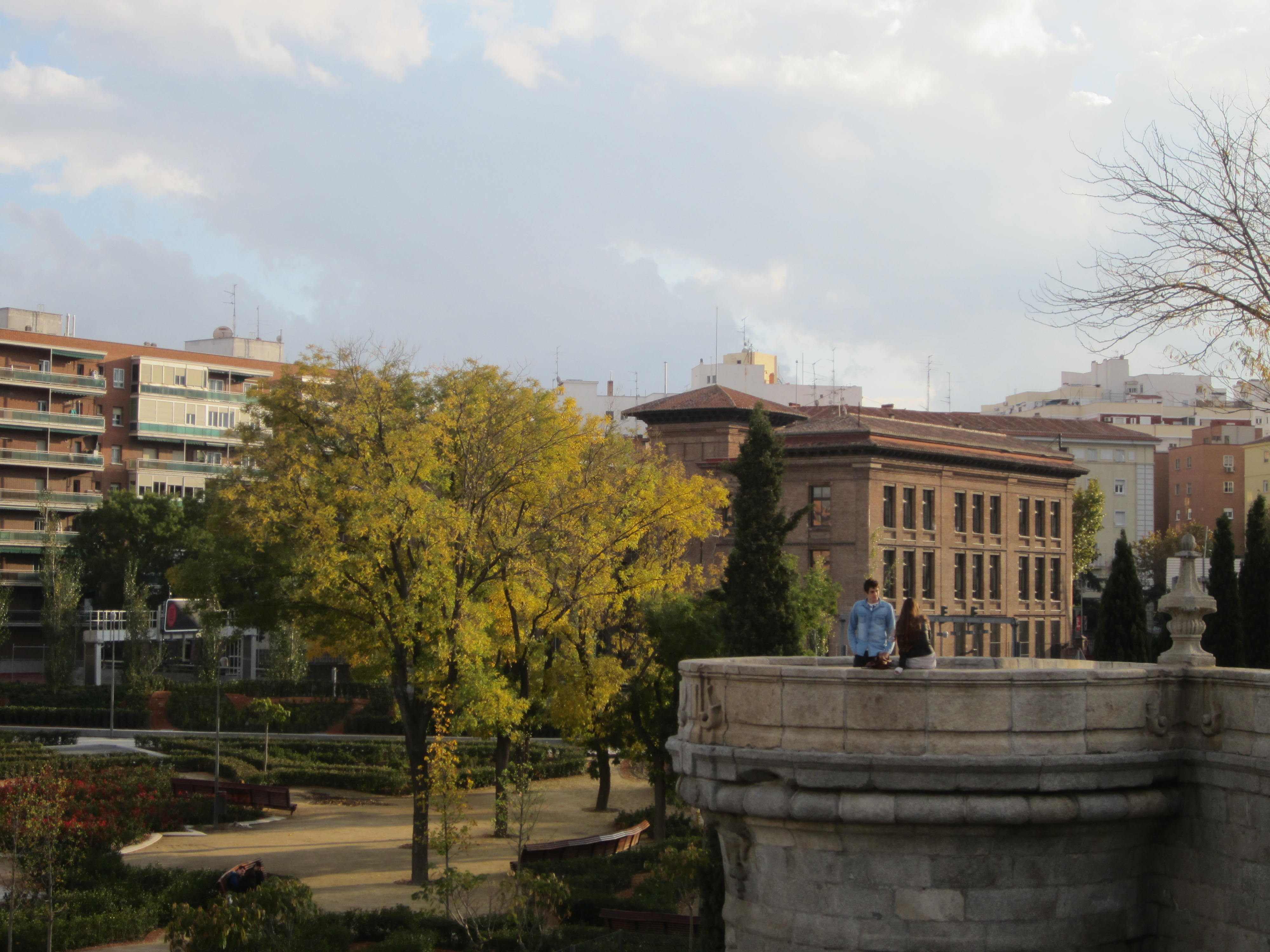 Romance, Madrid